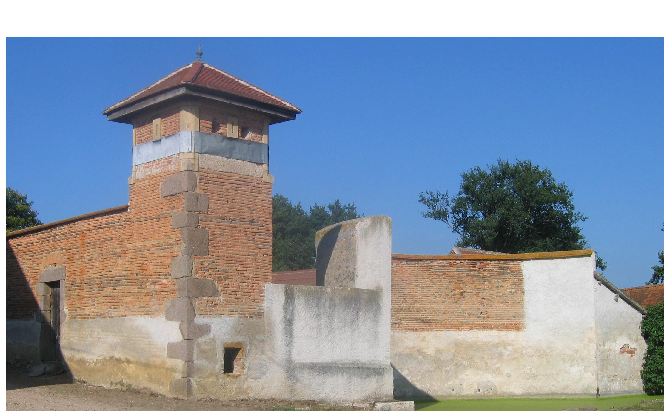 Pigeonnier de la ferme des Bécauds (Neuilly en Donjon)